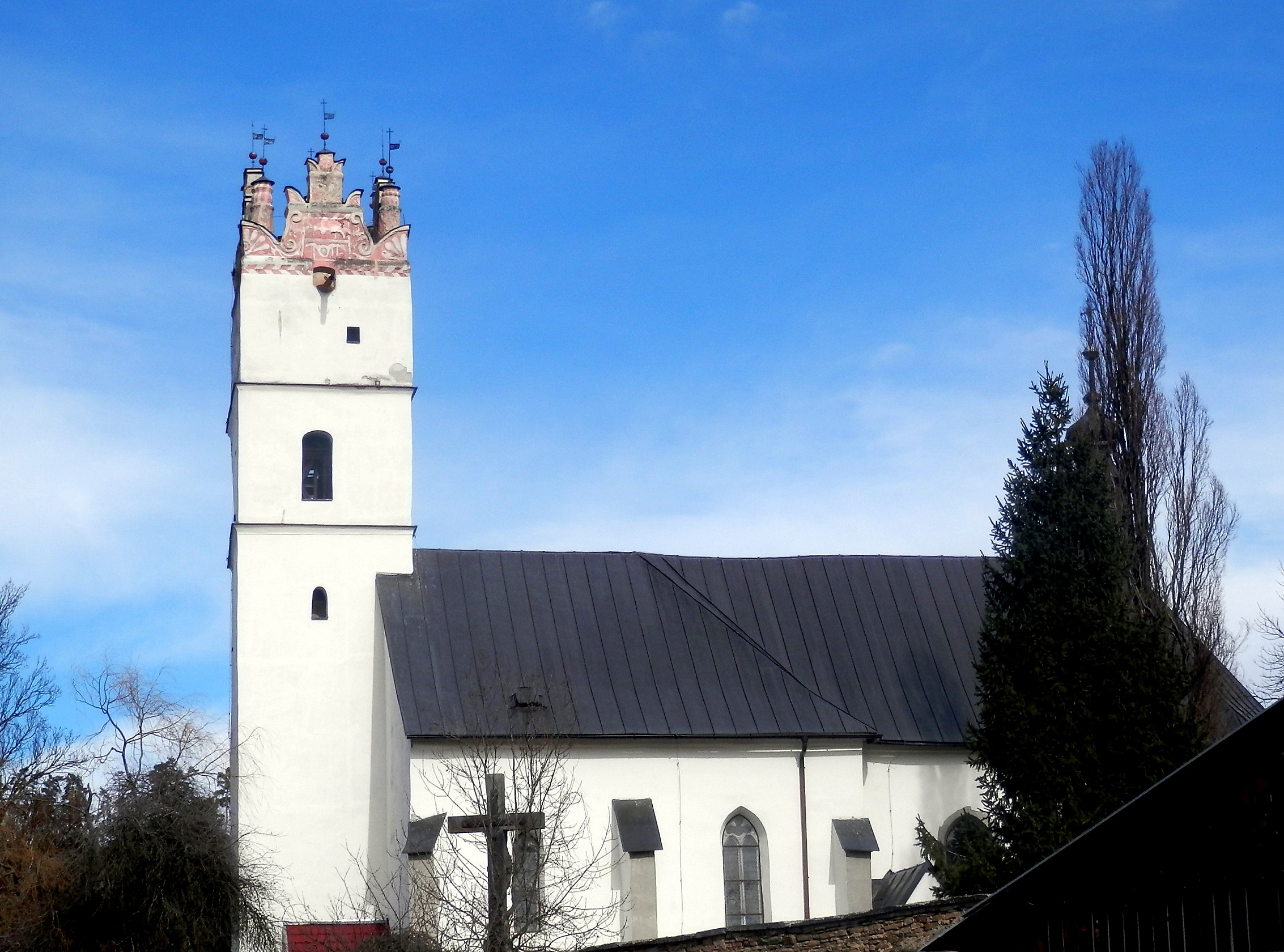 Rímsko katolícky kostol.sv.Šimona a Júdu. Spišský Hrhov, okres Levoča. Slovensko.